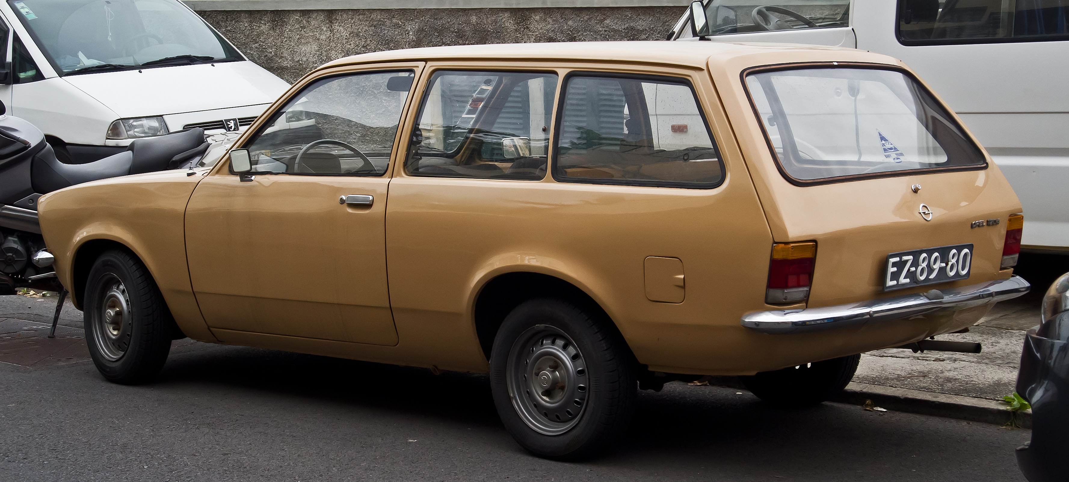 Opel 1204 Caravan